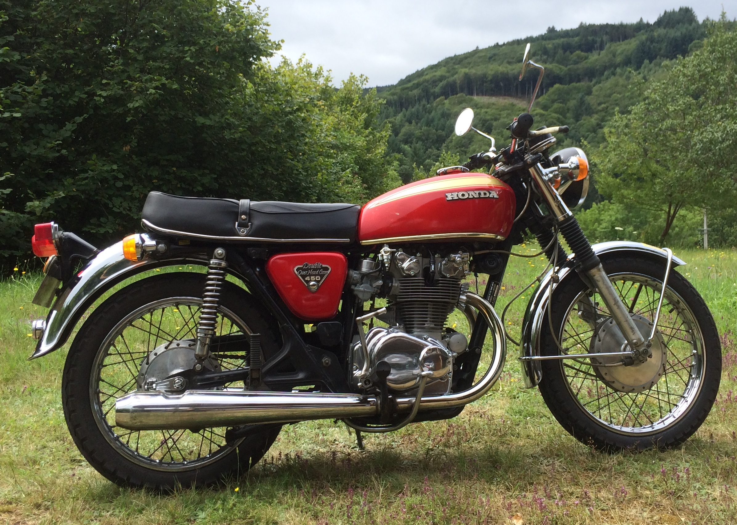 moto Honda CB450 K5 de 1973